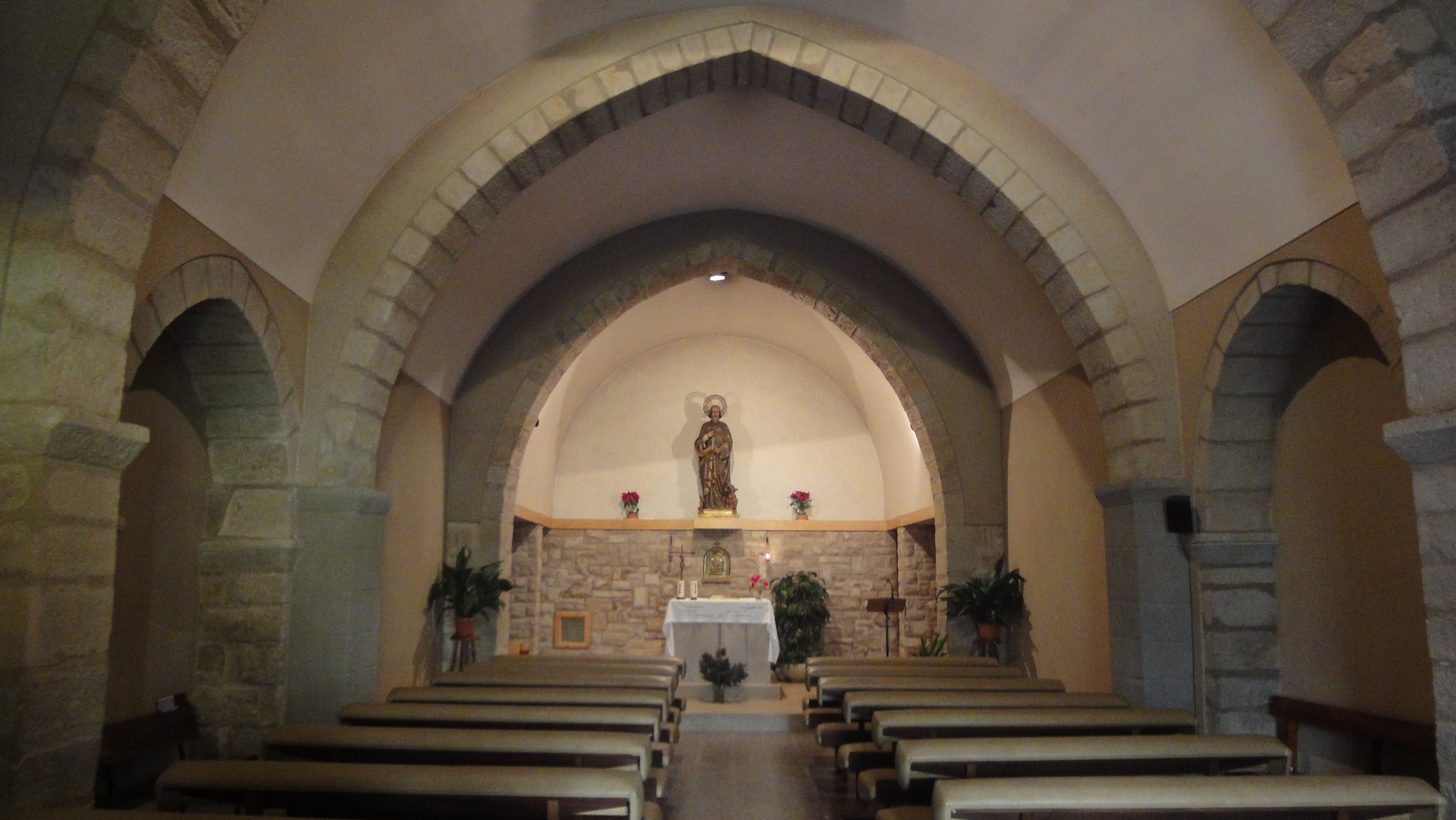 San "Bartomeu de la Valldán" vista interior de la iglesia